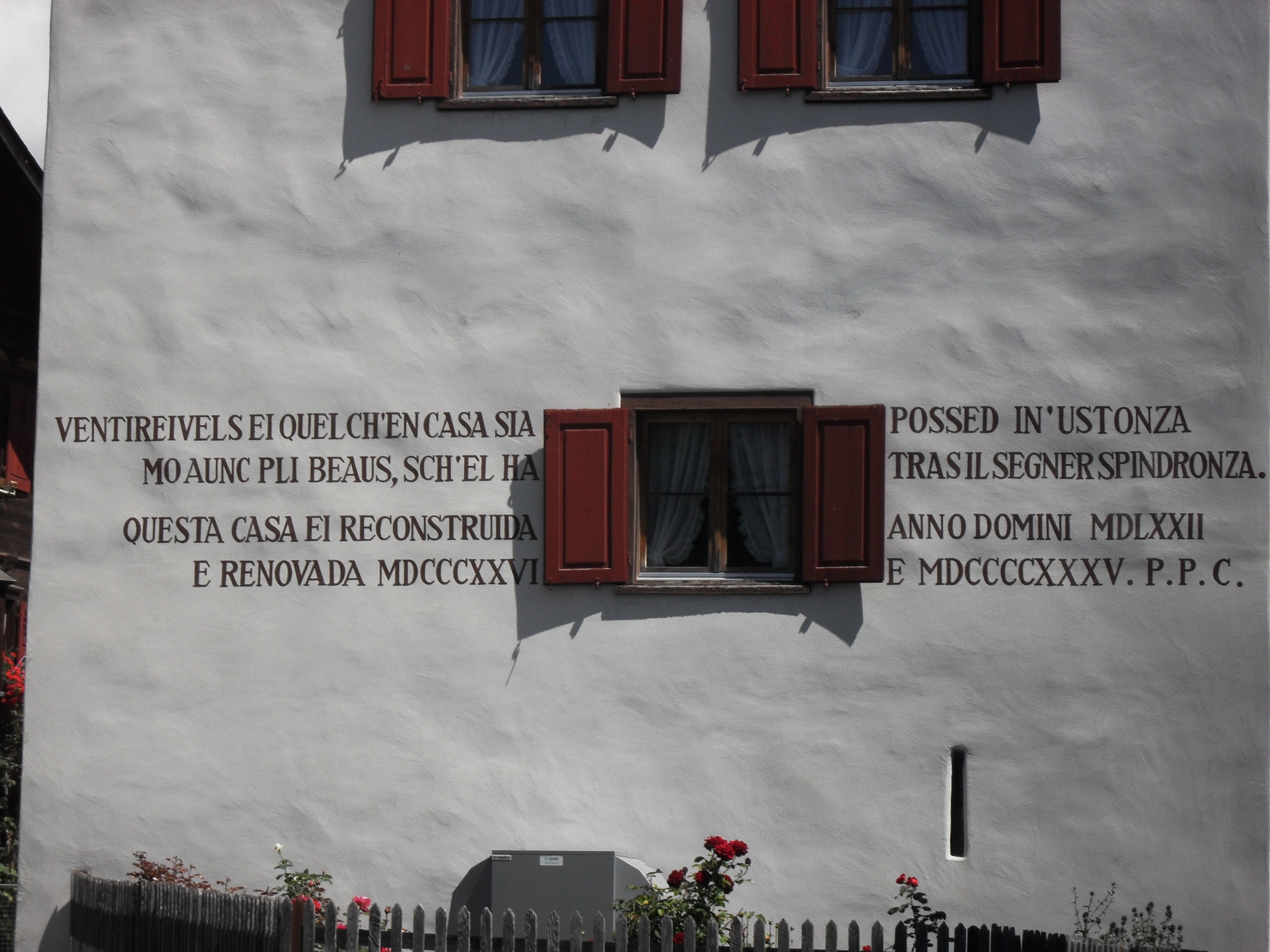 Rätoromanische Hausinschrift in Waltensburg/Vuorz